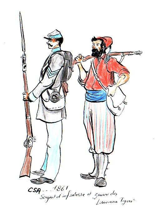 dessin personnel de Jp.negre